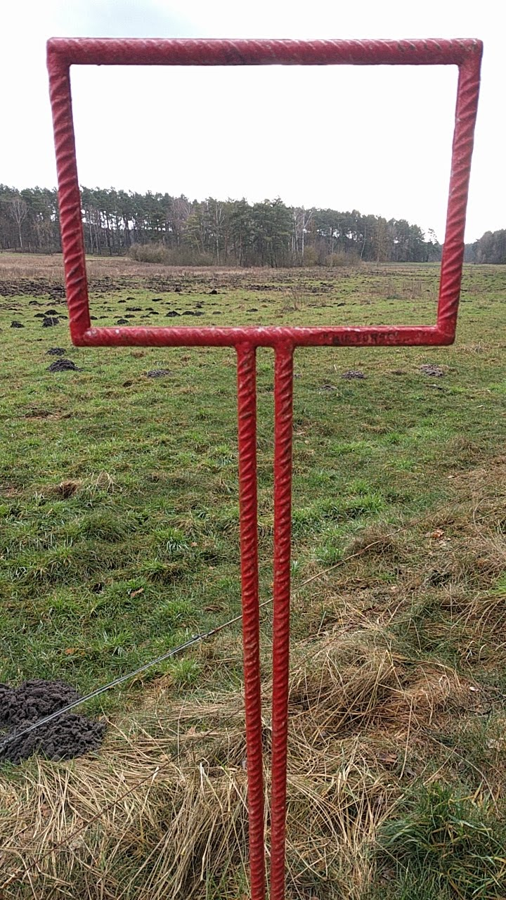 Landmark auf dem Weg von der Wehrmühle in Biesenthal, links entlang der Finow, kurz vor Pöhlitzbrück